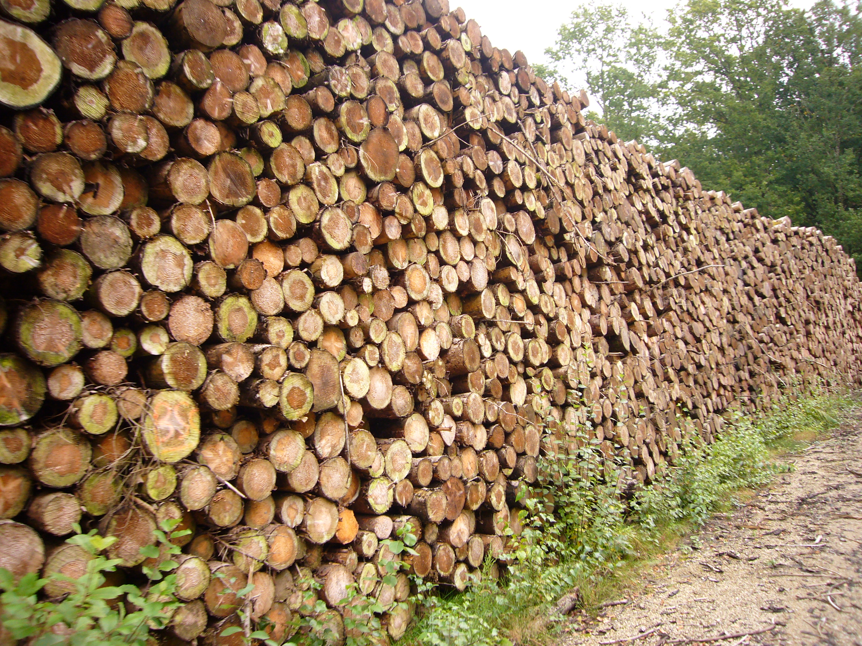 Bois entassé près de Nedde, en Haute-Vienne (France)